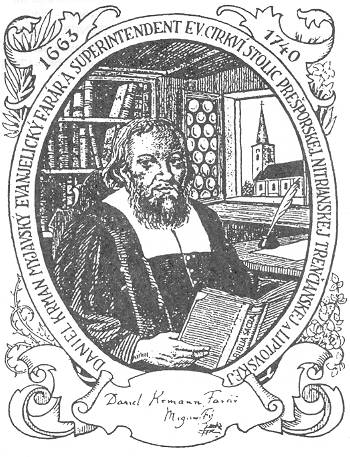 Daniel Krman (1663-1740)